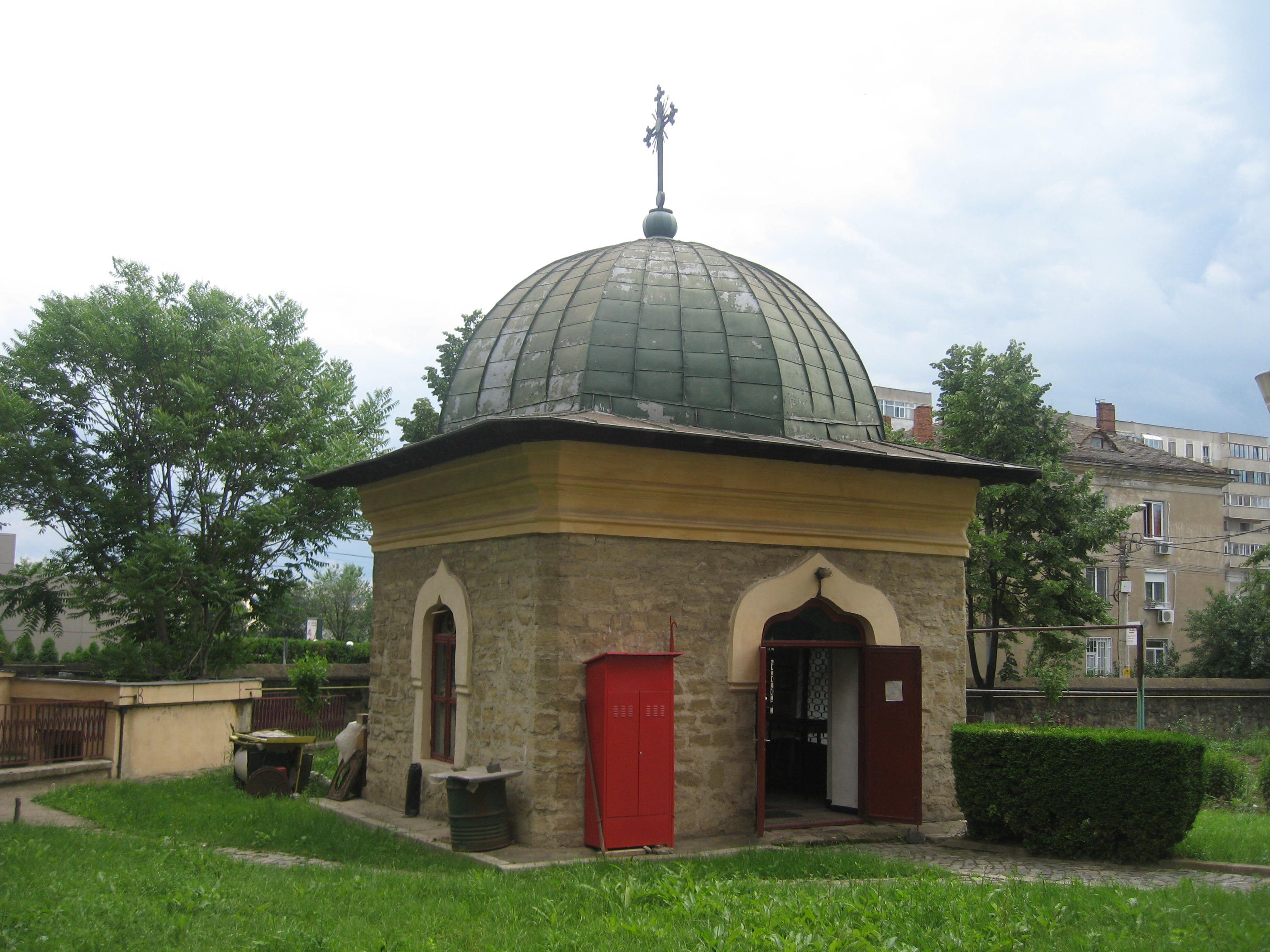 Biserica Bărboi din Iași